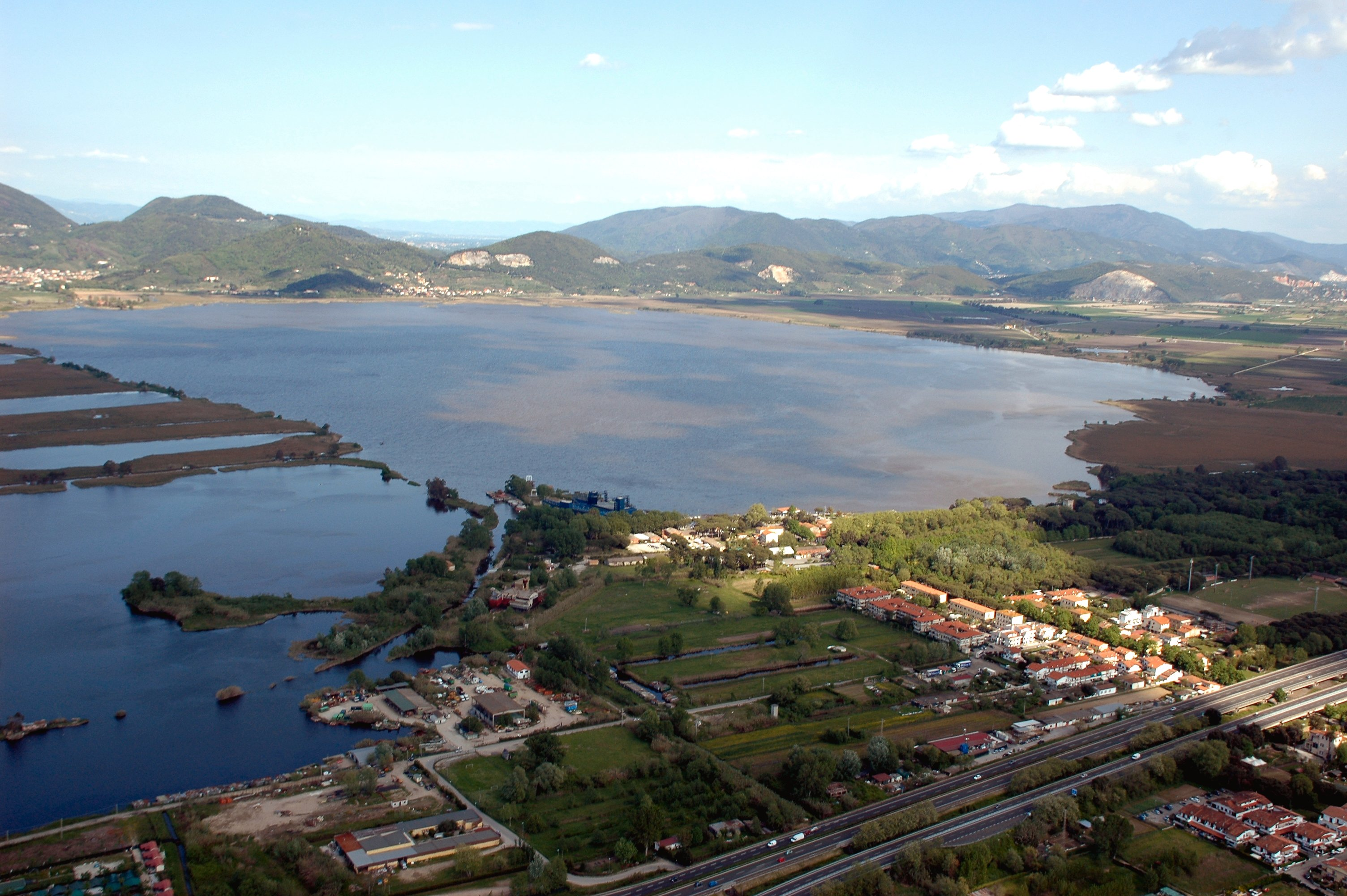 Lago di Massaciuccoli